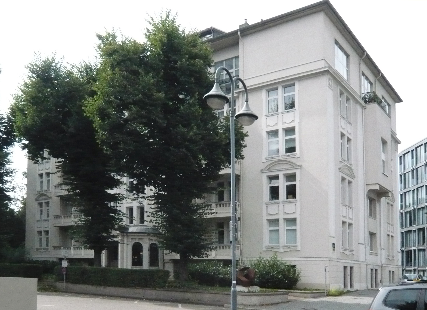 Künstler Atelier-Haus, Sittarderstraße 5, Düsseldorf